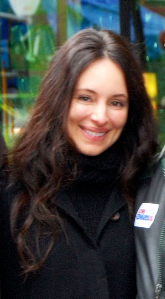 Madeleine Stowe and my friend Mike.